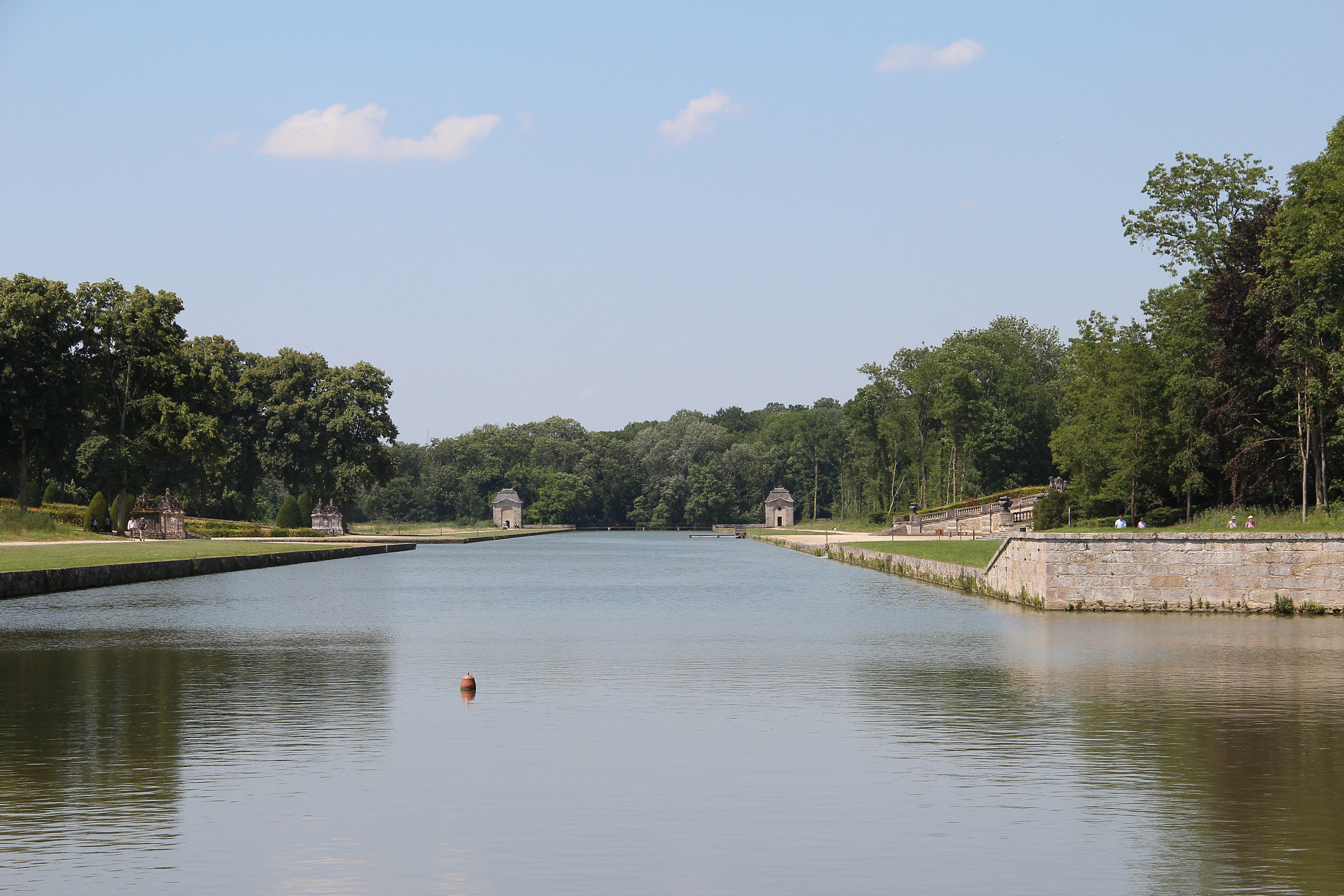 Le Grand Canal ou Canal de la Poêle dans les jardins du château de Vaux-le-Vicomte - Maincy (Seine-et-Marne, France).